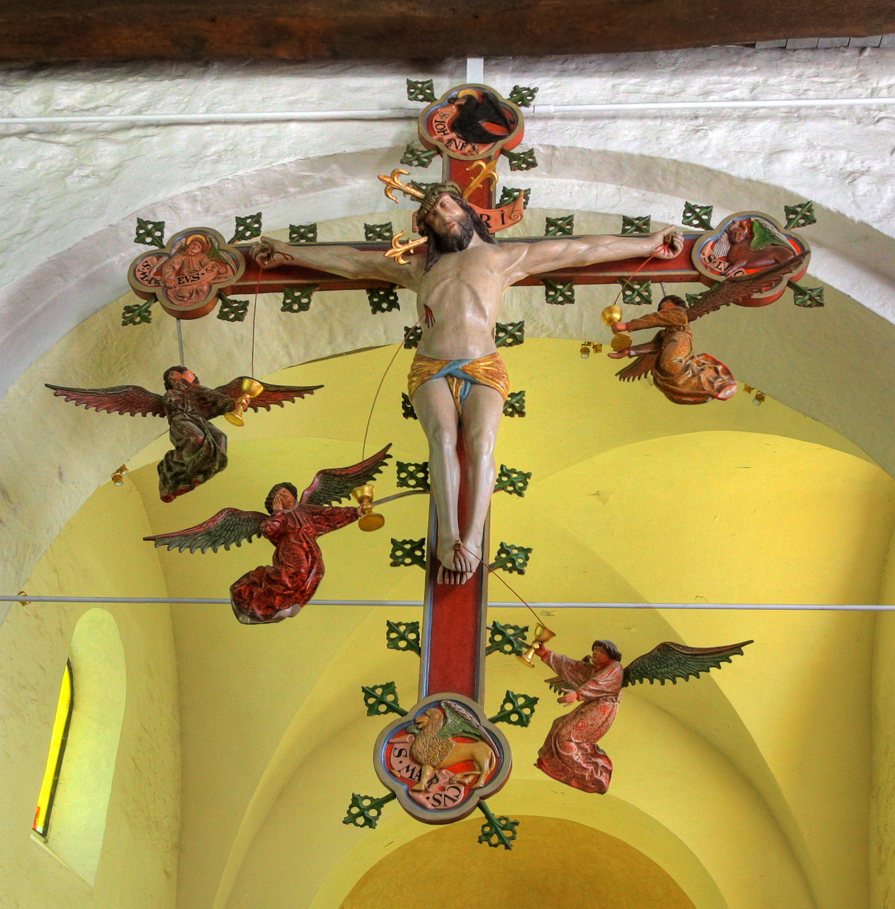 Petrikirche in Bosau, Triumphkreuz